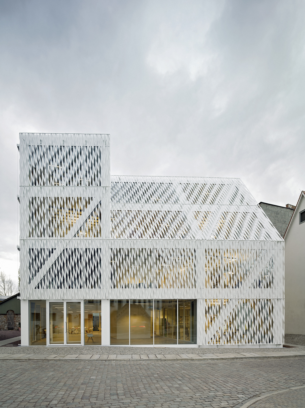 Foto: Jens Passoth